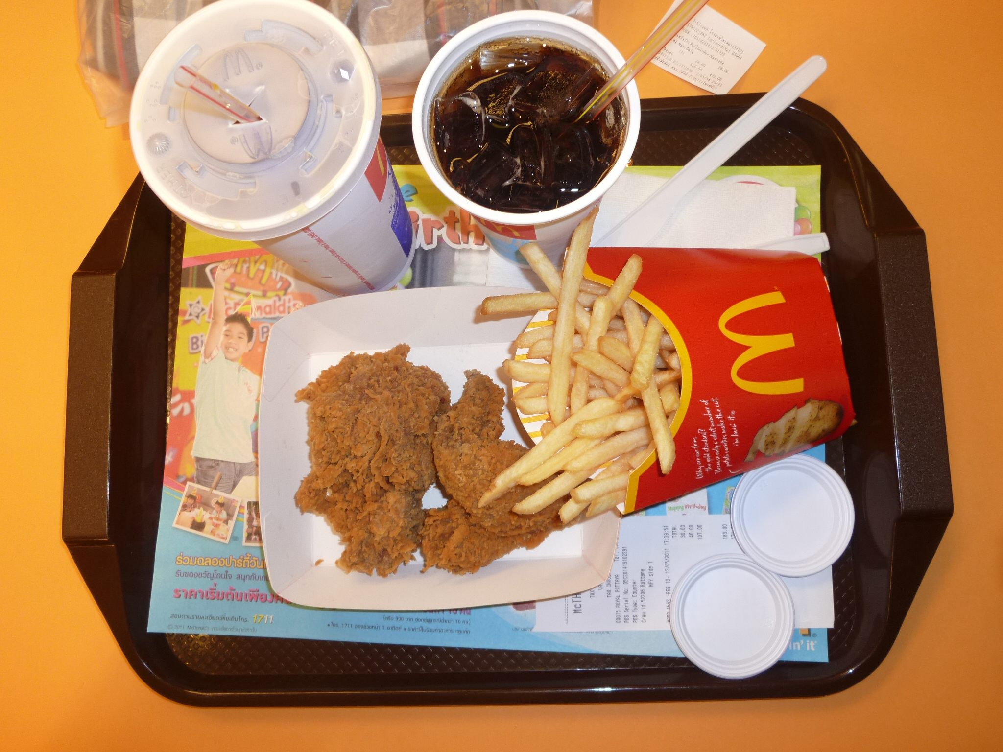 泰國麥當勞 Royal Pattaya 餐廳於2011年5月13日提供的部分餐點